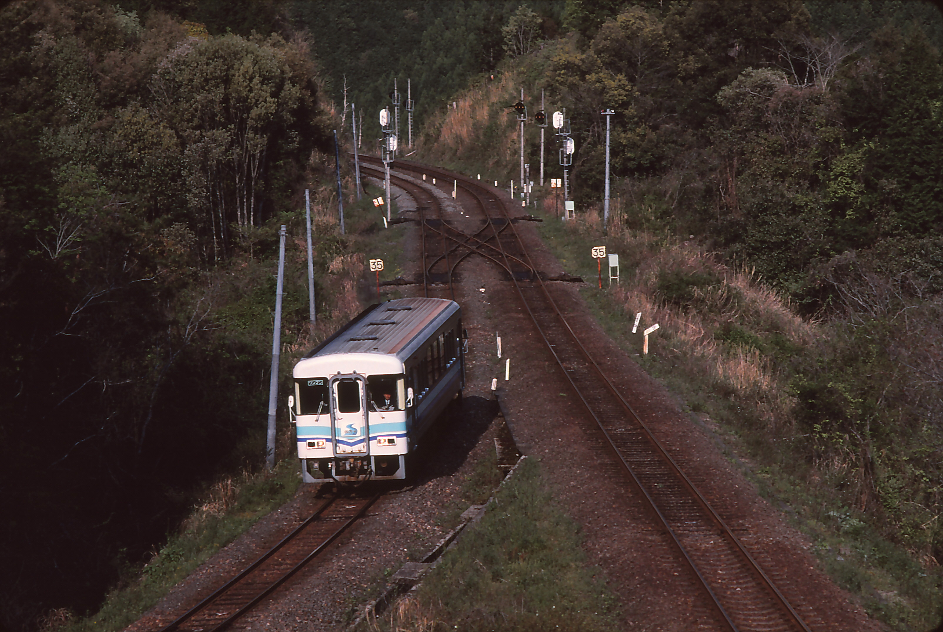 川奥信号場 左側が土佐くろしお鉄道。 右側がJR予土線 高知県幡多郡黒潮町川奥